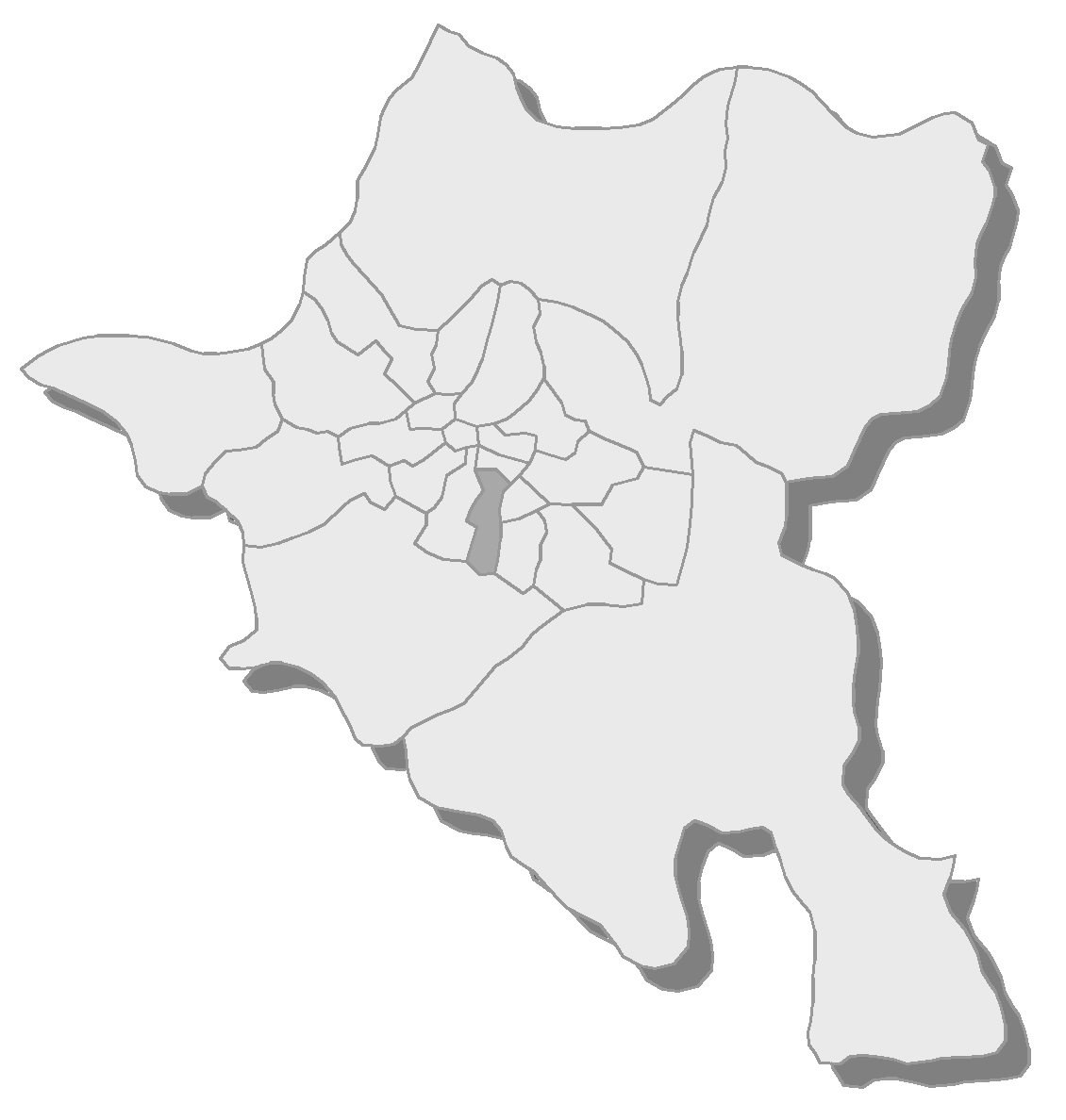 Sofia, municipality Lozenetz